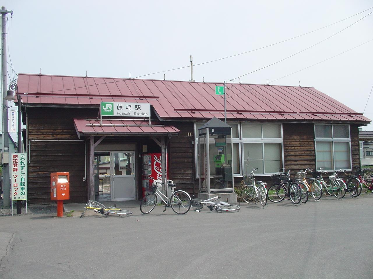 （五能線藤崎駅）